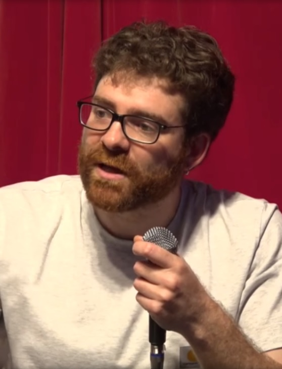 Presentación de 'No tengo tiempo. Geografías de la precariedad'.